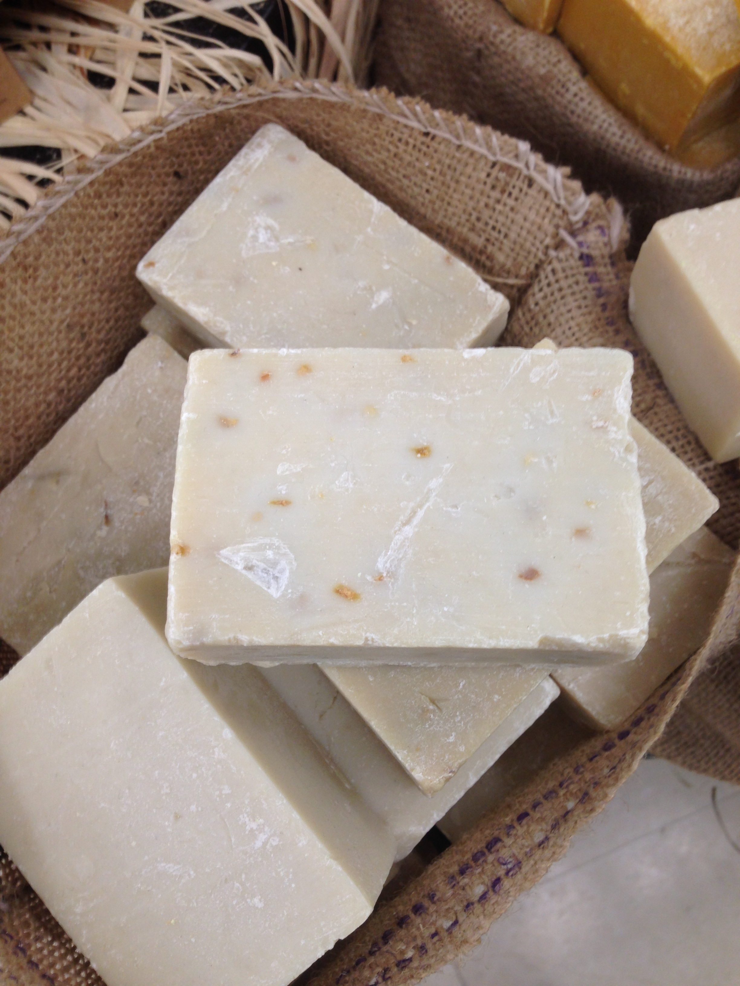 çeşitli renkte ve içerikte sabunlar